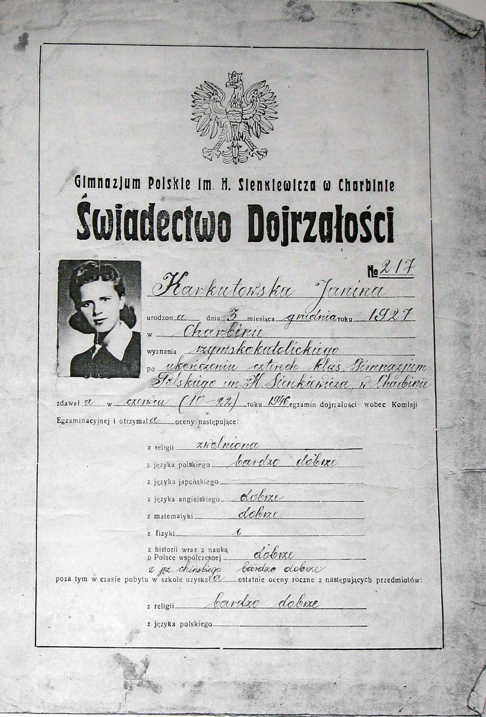 gimnazium Sienkiewicza w Charbinie